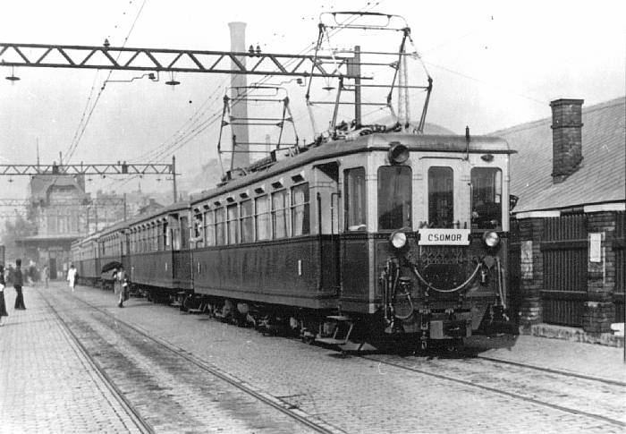 MVII-es motorvonat a Keleti pályaudvarnál az 1930-as években